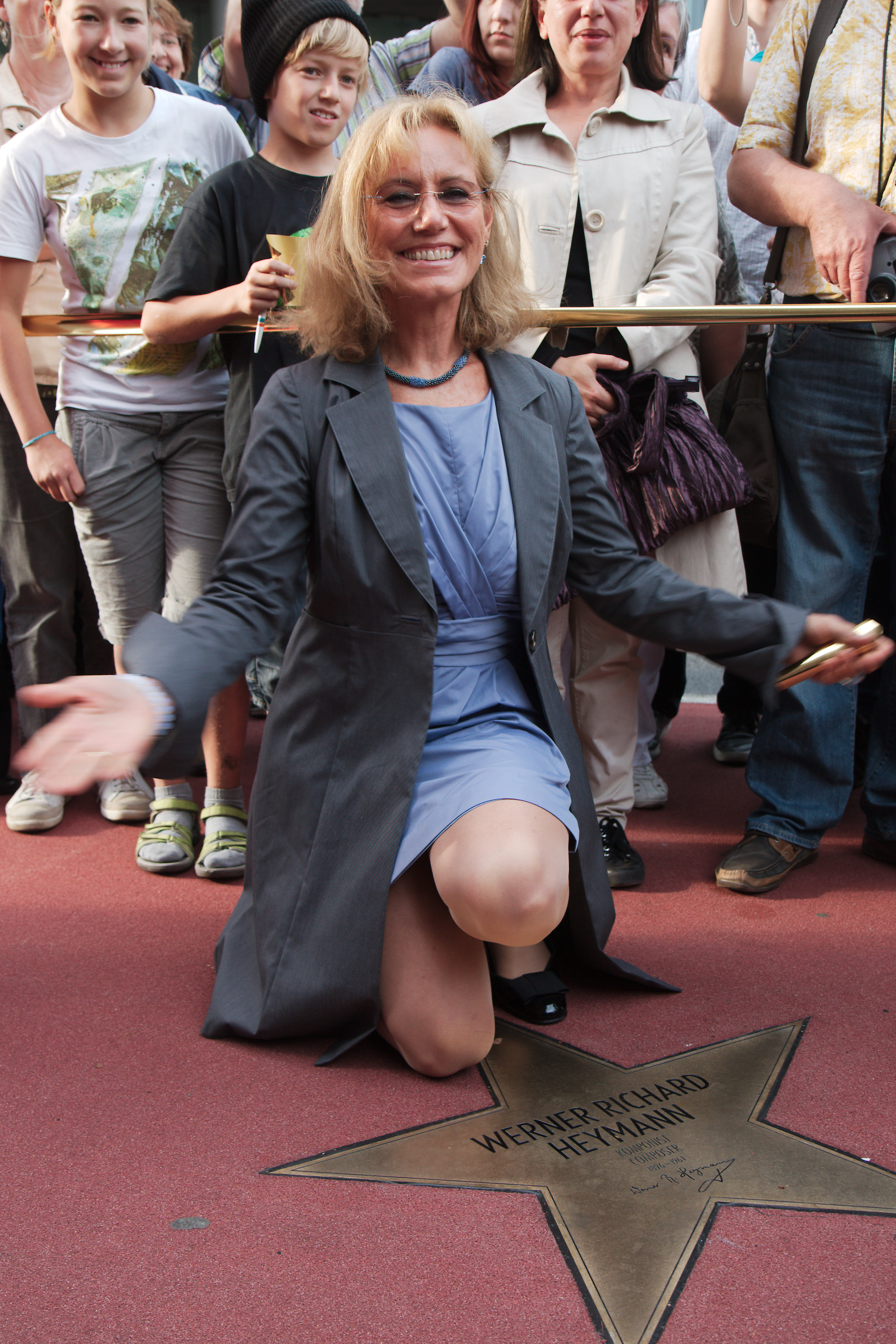 Heymanns Tochter freut sich über den Stern.